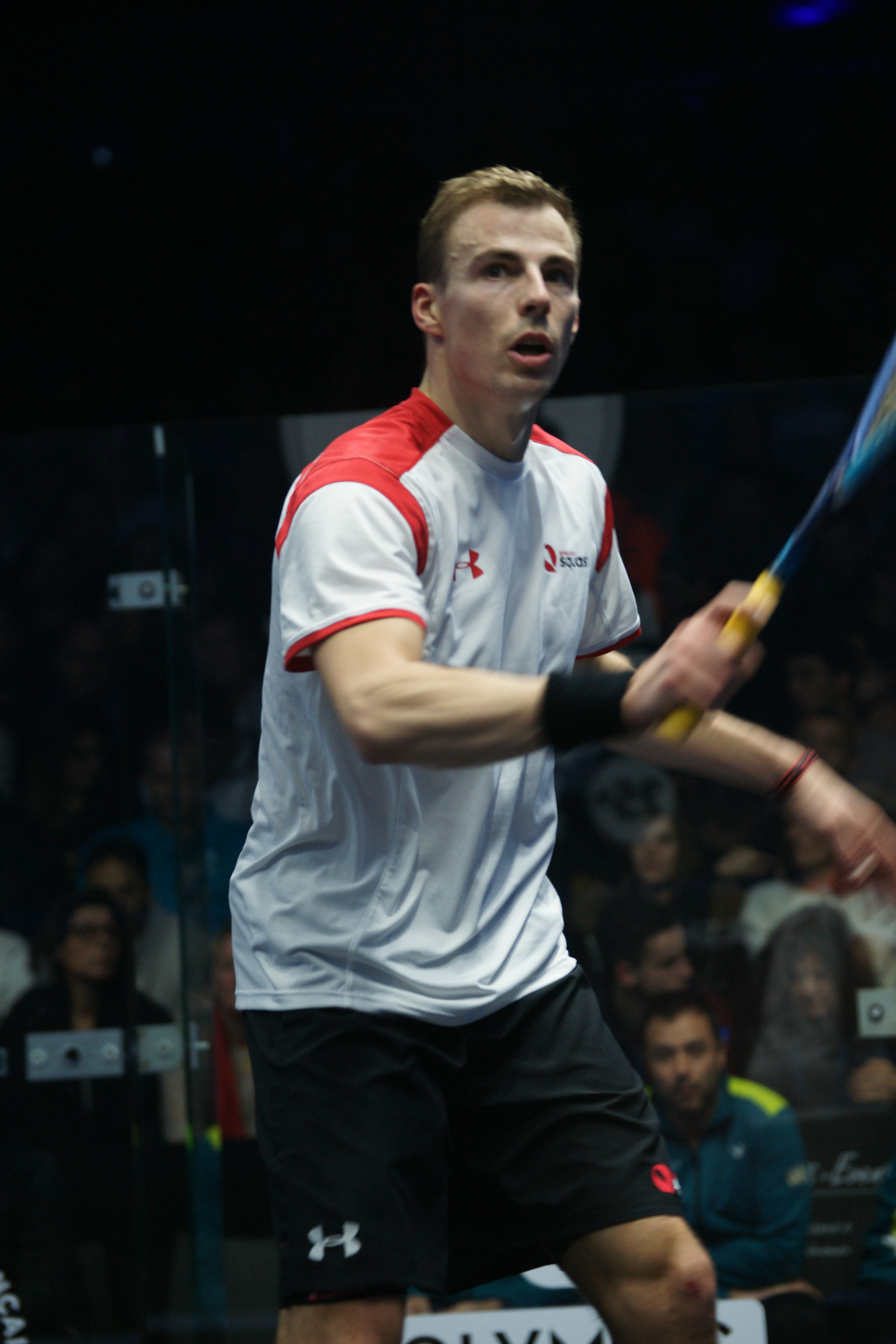 championnats du monde de squash par équipe Marseille 2017